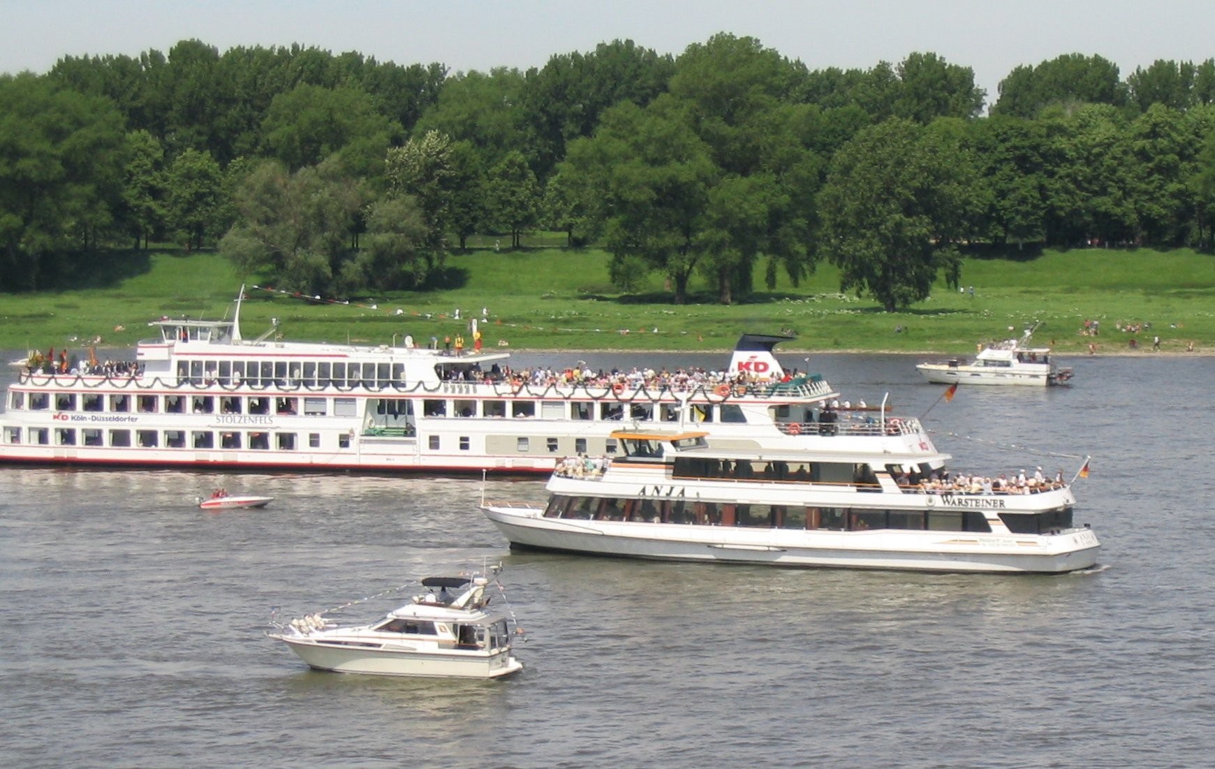 Ausschnitt aus der Schiffsprozession im Rahmen der Mülheimer Gottestracht, Fronleichnam 2005. Das Foto zeigt das Zurücktreiben einiger Boote zwischen Zoobrücke und Mülheimer Brücke.